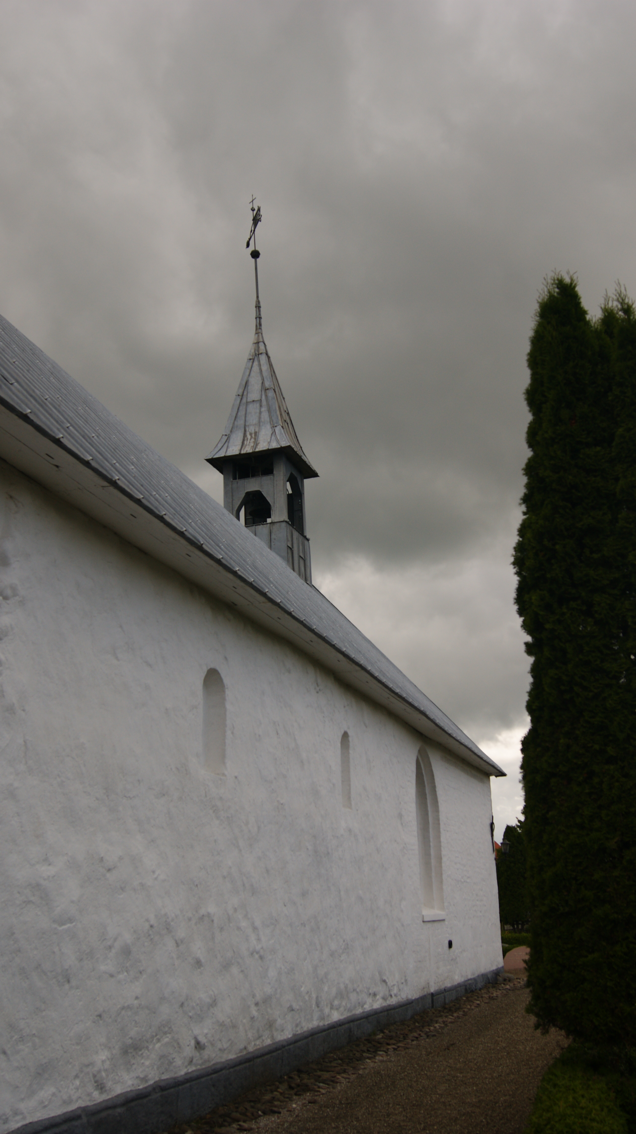 Nord: spor af romansk arkitektur.